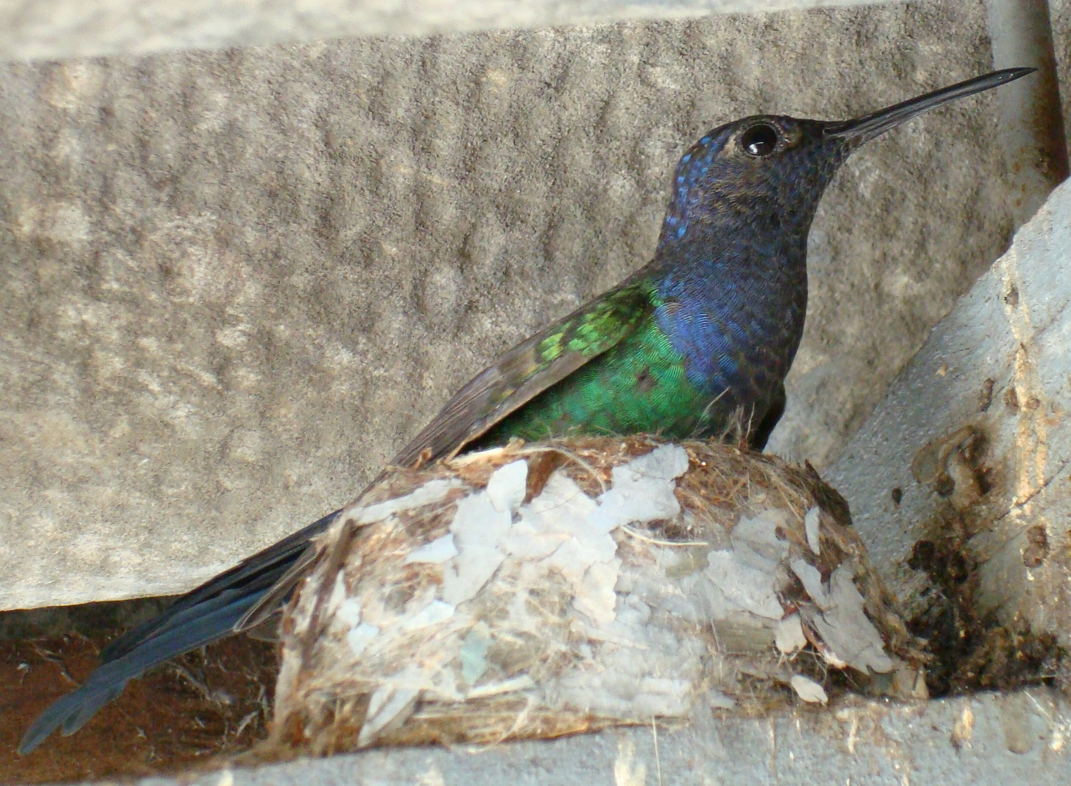 Swallow-tailed Hummingbird (Eupetomena macroura) on nest in Ribeirão Preto, São Paulo, Brazil.